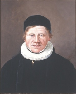 Nicolai (Niels) Nielsen Eier: Eidsvoll 1814